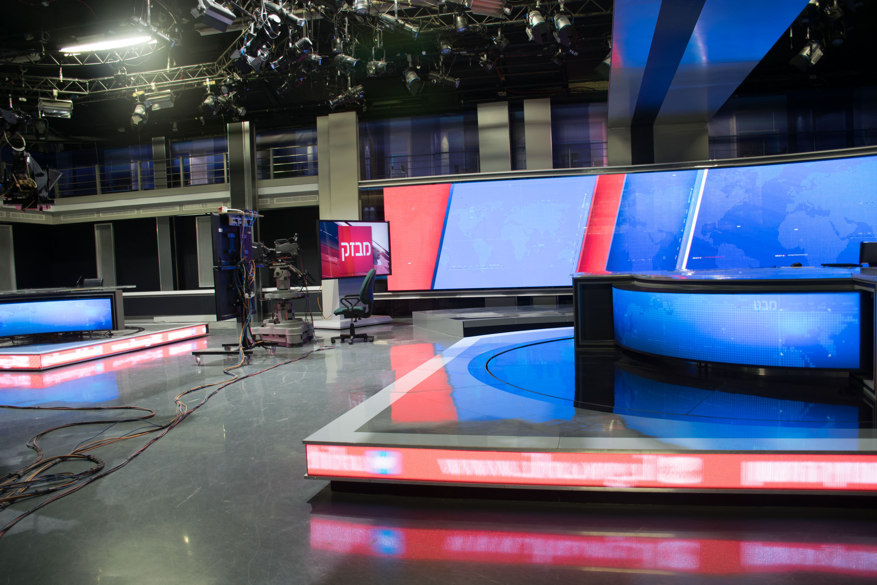 הערוץ הראשון אולפן שידור